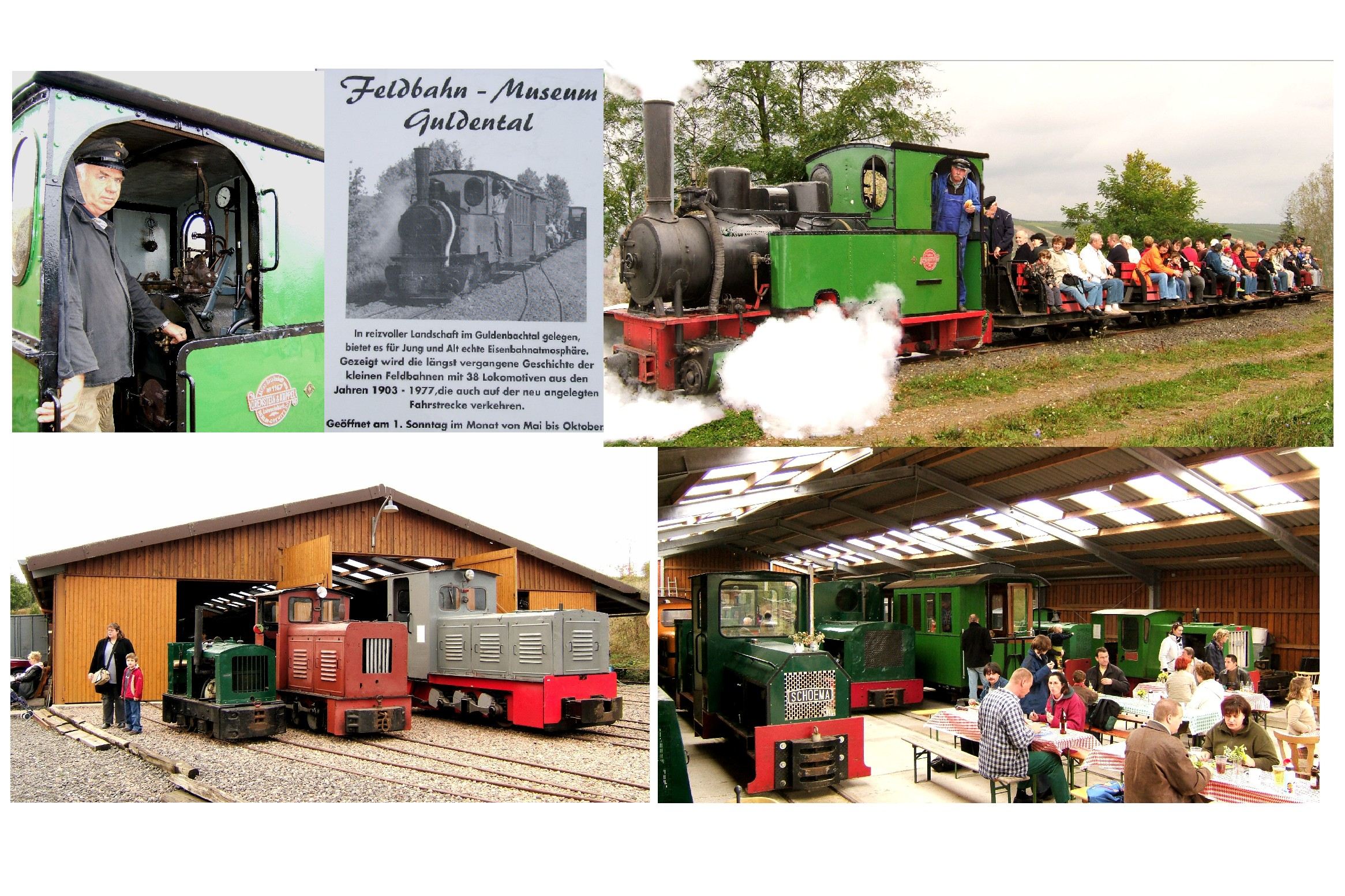 Fahrtag - Feldbahn mit Feldbahn Museum